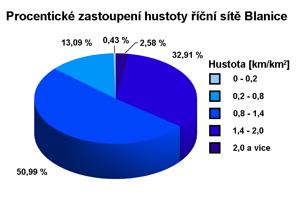 Procentické zastoupení hustoty říční sítě Vlašimské Blanice